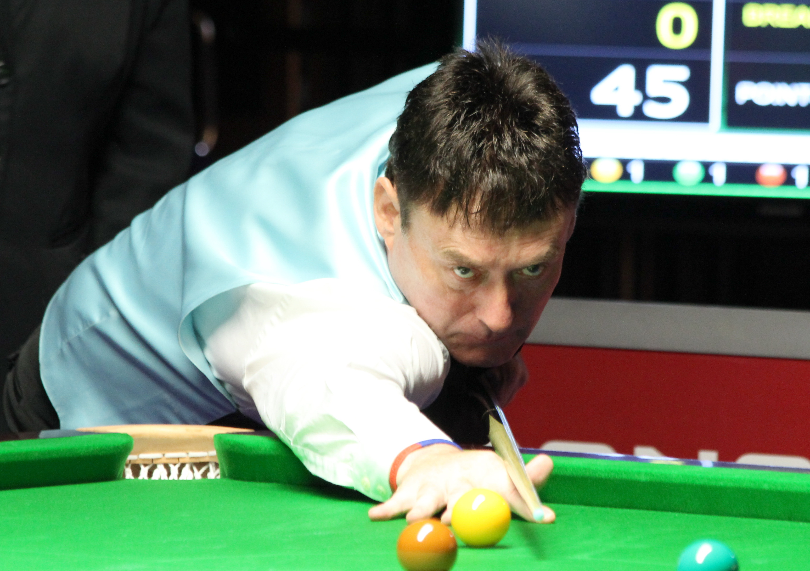 Jimmy White beim Paul Hunter Classic 2016